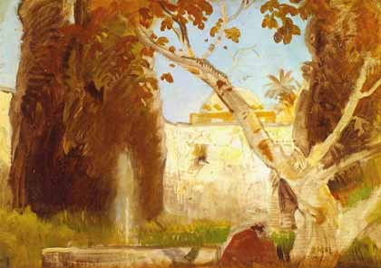 Szenenentwurf zu "Paulus", Szenisches Oratorium (Mendelssohn-Bartholdy) - Stephanus; Düsseldorf 1870; Öl auf Leinwand; 30,5 x 44 cm; Theaterwissenschaftliche Sammlung der Universität zu Köln (Schloss Wahn), Inv.-Nr. 1535 a